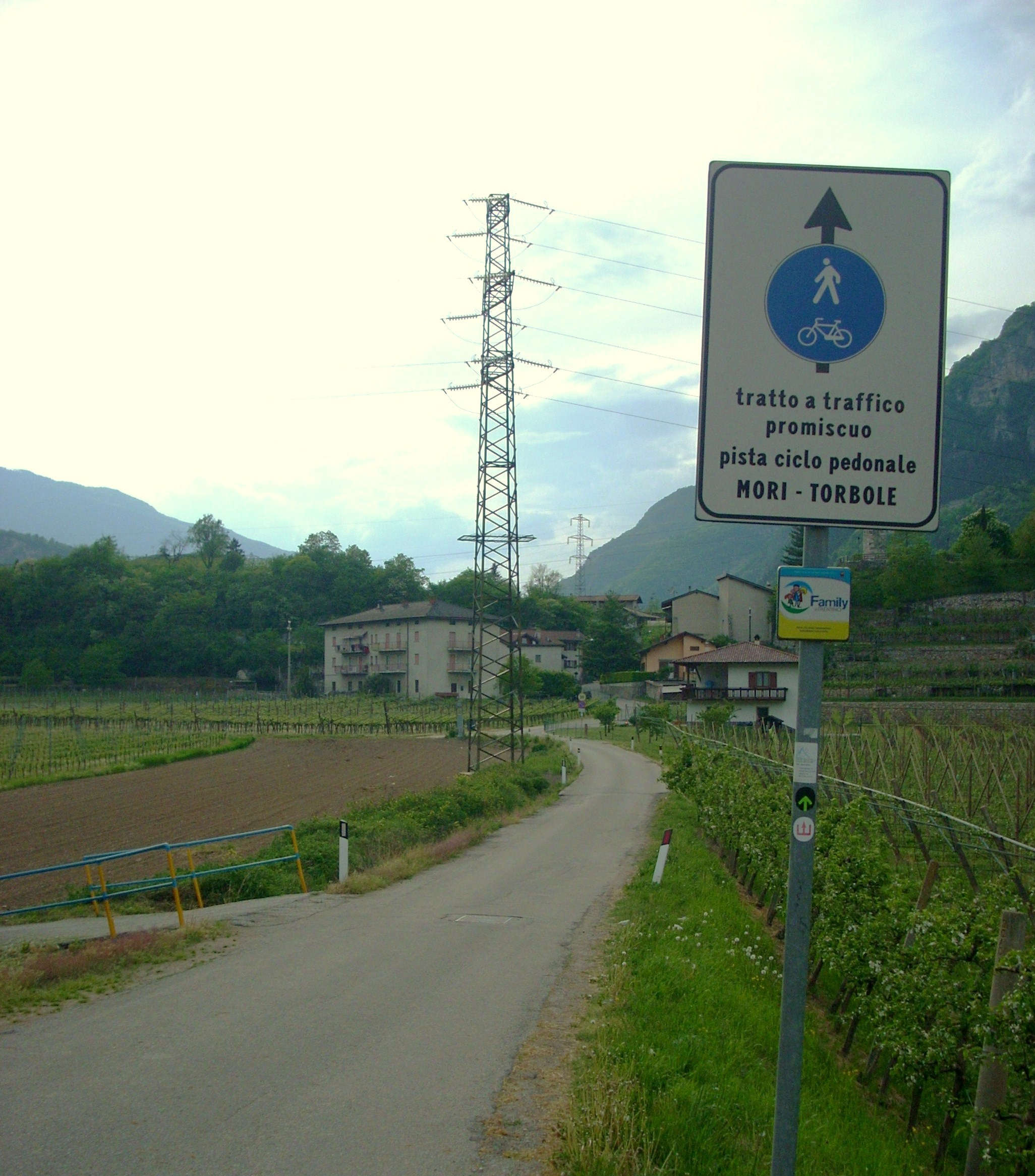 Inizio della pista ciclabile Rovereto - Lago di Garda